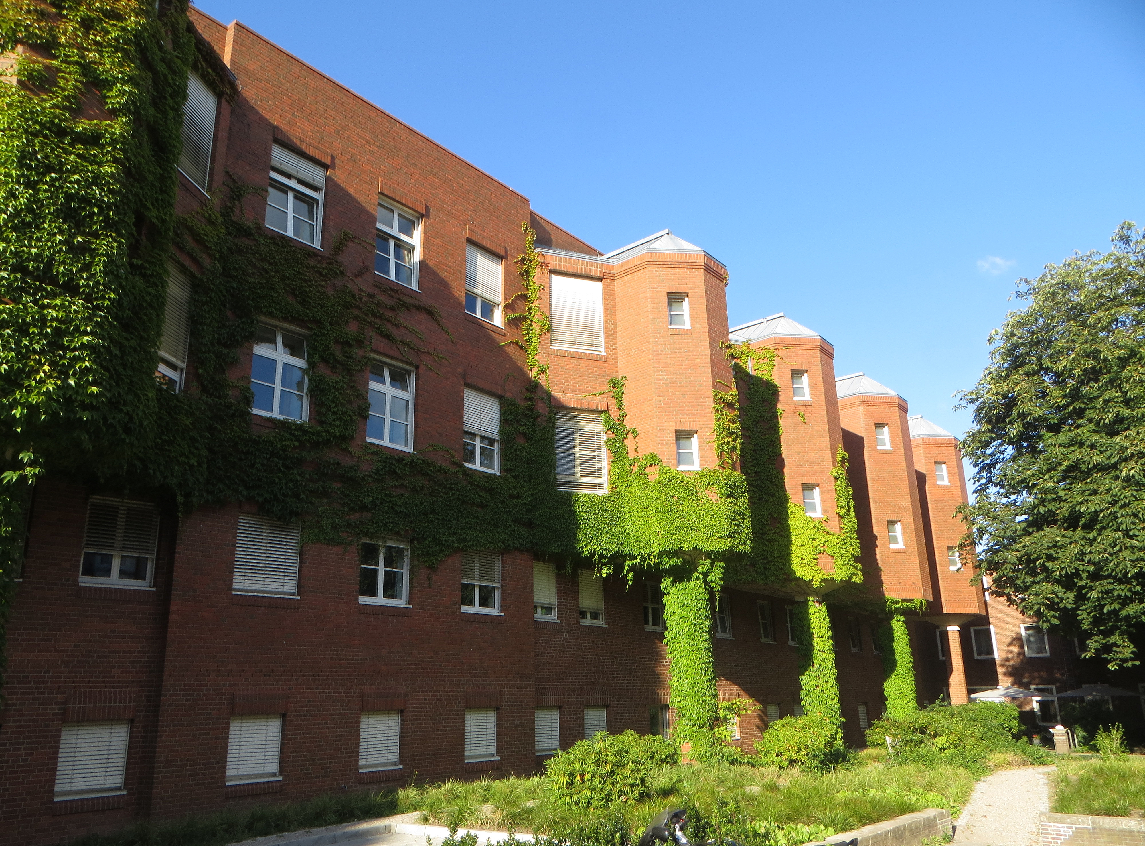 Malteser Krankenhaus St. Franziskus-Hospital, von der Dorotheenstraße aus, Bild 02